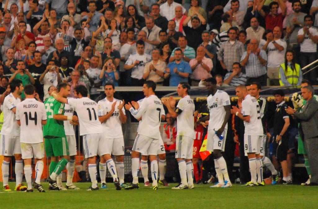 Jerzy Dudek lors de son dernier match, applaudi par son équipe lors d'un match entre le Real Madrid et l'UD Almería.